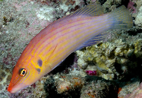 Un labre Pseudocheilinus octotaenia à la Réunion.